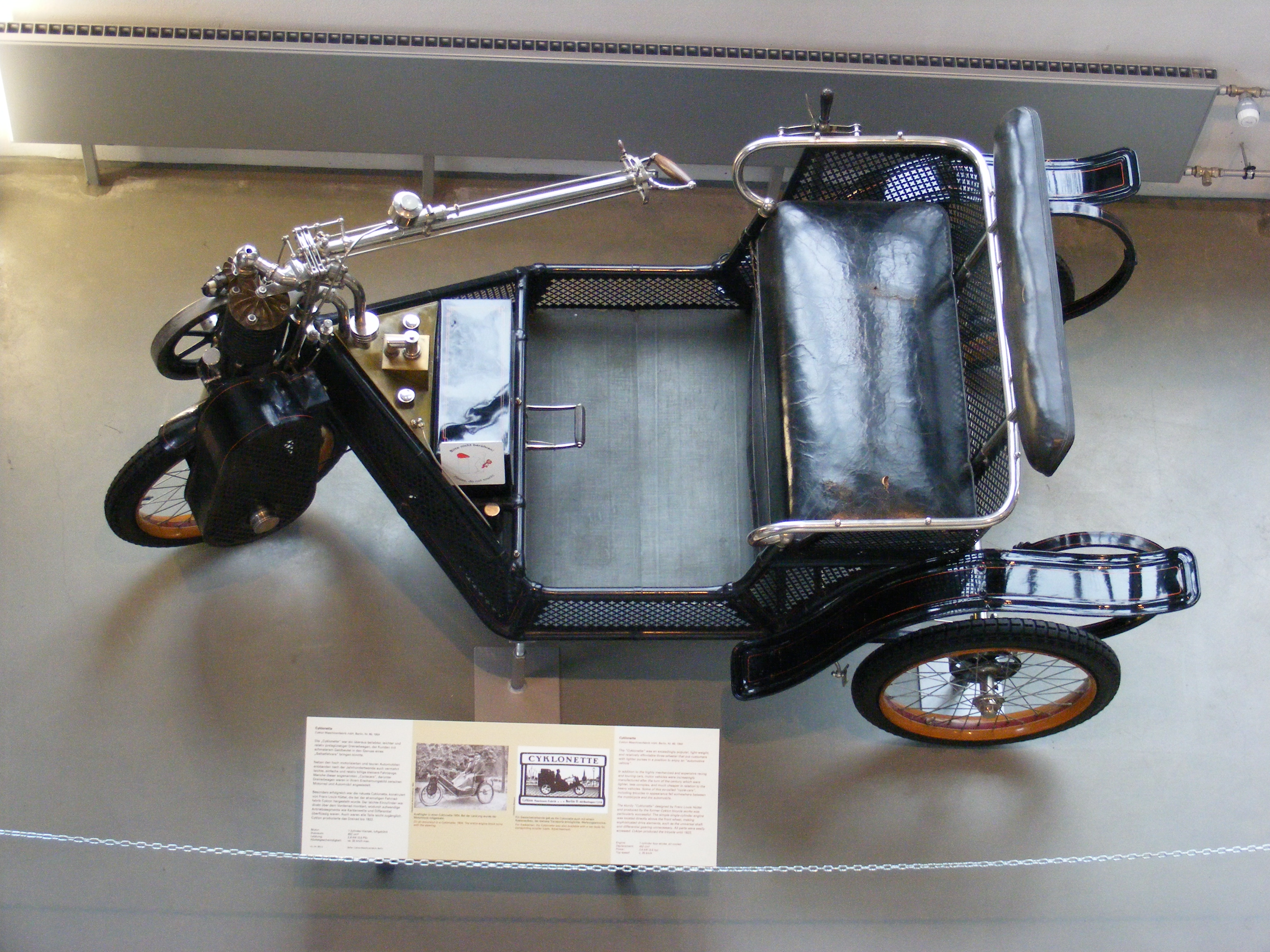 Cyklonette (Hersteller: Cyklon Maschinenfabrik m.b.H., Berlin Ost, Alt-Boxhagen), bei der Lenkung wurde der Motorblock mitgedreht — Exponat im Deutschen Museum Verkehrszentrum München